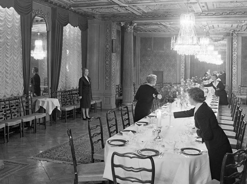 Grev Turegatan 12. Restaurant Tattersall, 1960-tal